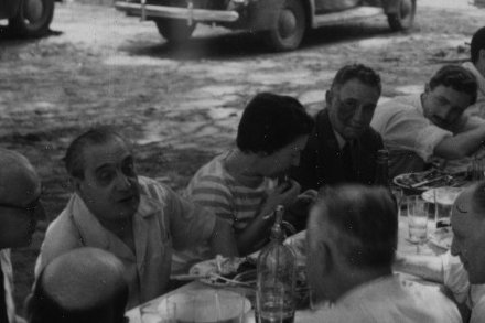 Luis Jiménez de Asúa, Ángela Romero Vera, Domingo Buonocuore, Guillermo Estévez Boero, en almuerzo de homenaje a Sebastián Soler, Santa Fe, Argentina, 1958